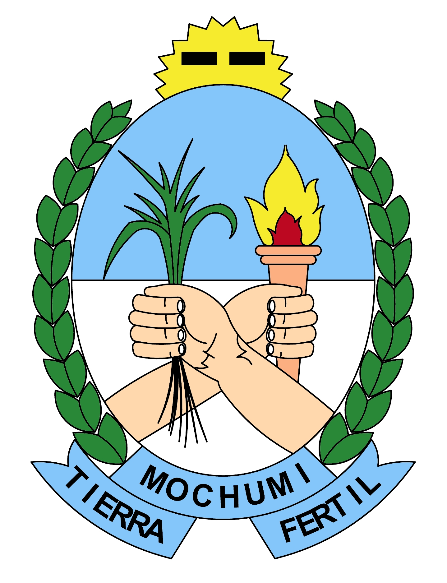 Escudo del distrito de Mochumí.